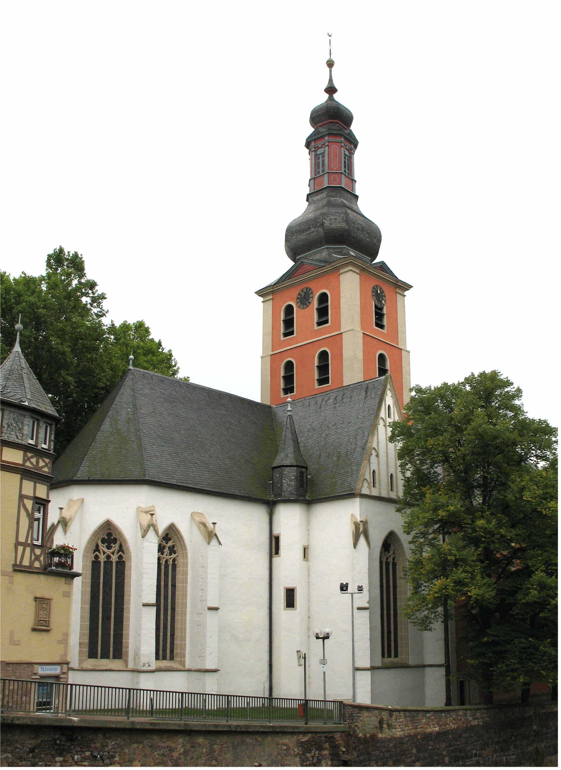 Pauluskierch zu Bad Kreuznach